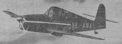 Skandinaviska Aero BHT-1 Beauty (Les Ailes, novembre 1946)